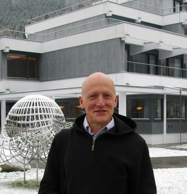 Foto di Chris Rogers